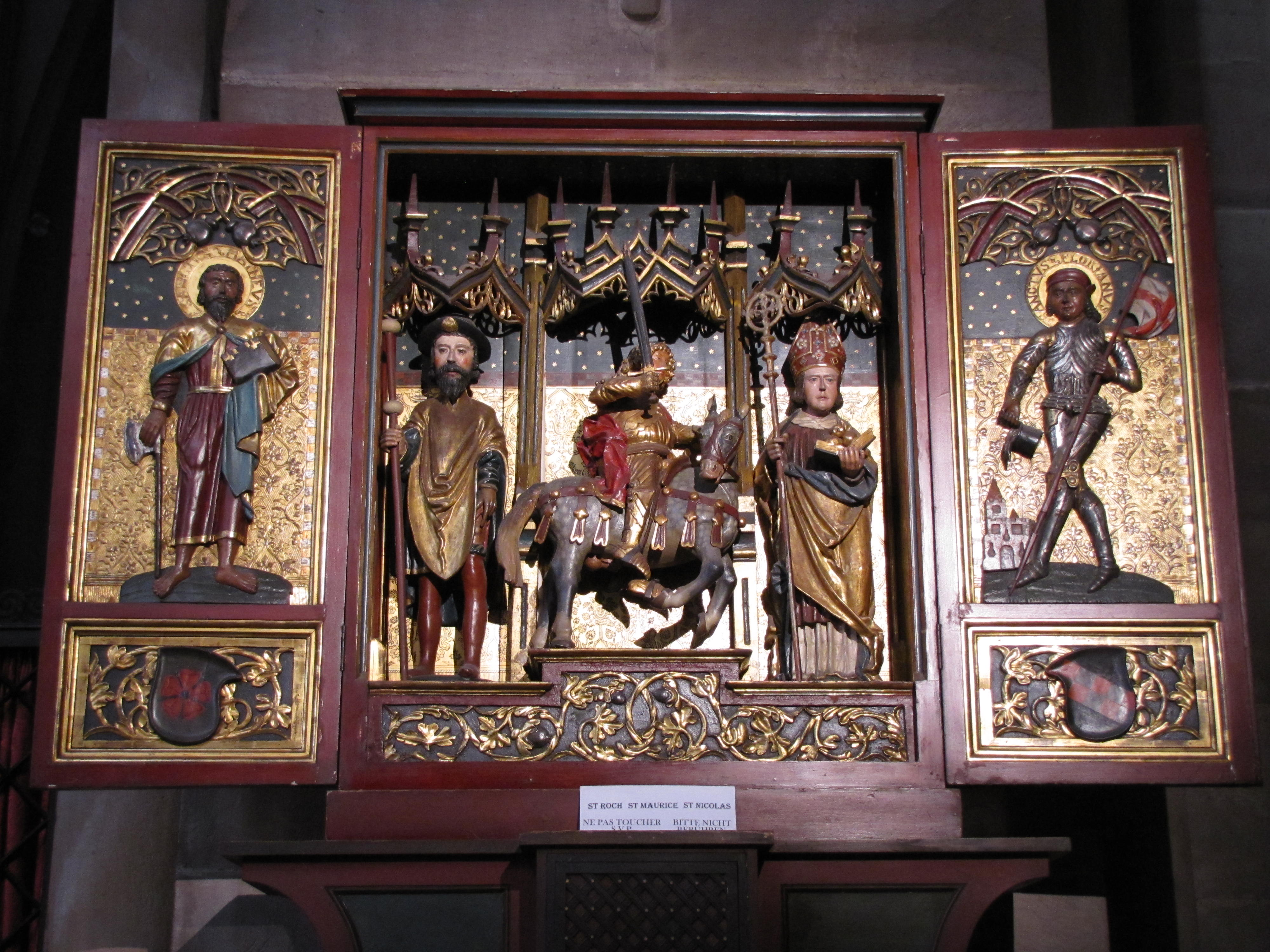 Alsace, Bas-Rhin, Cathédrale Notre-Dame de Strasbourg (PA00085015).Retable de Saint-Roch, Saint-Maurice et Saint-Nicolas (XVIe): Gauche (St-Matthieu), Central (St-Roch, St-Maurice, St-Nicolas), Droit (St-Florian)